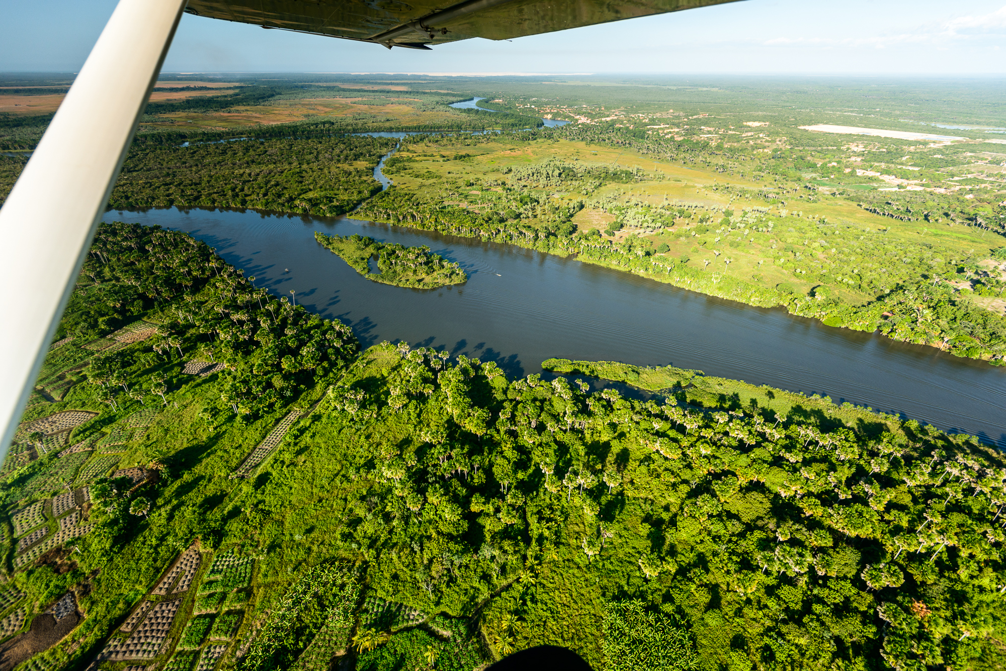 Margeando os Lençois Maranhenses